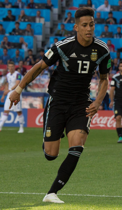 Месси и Ко не смогли обыграть неуступчивых исландцев